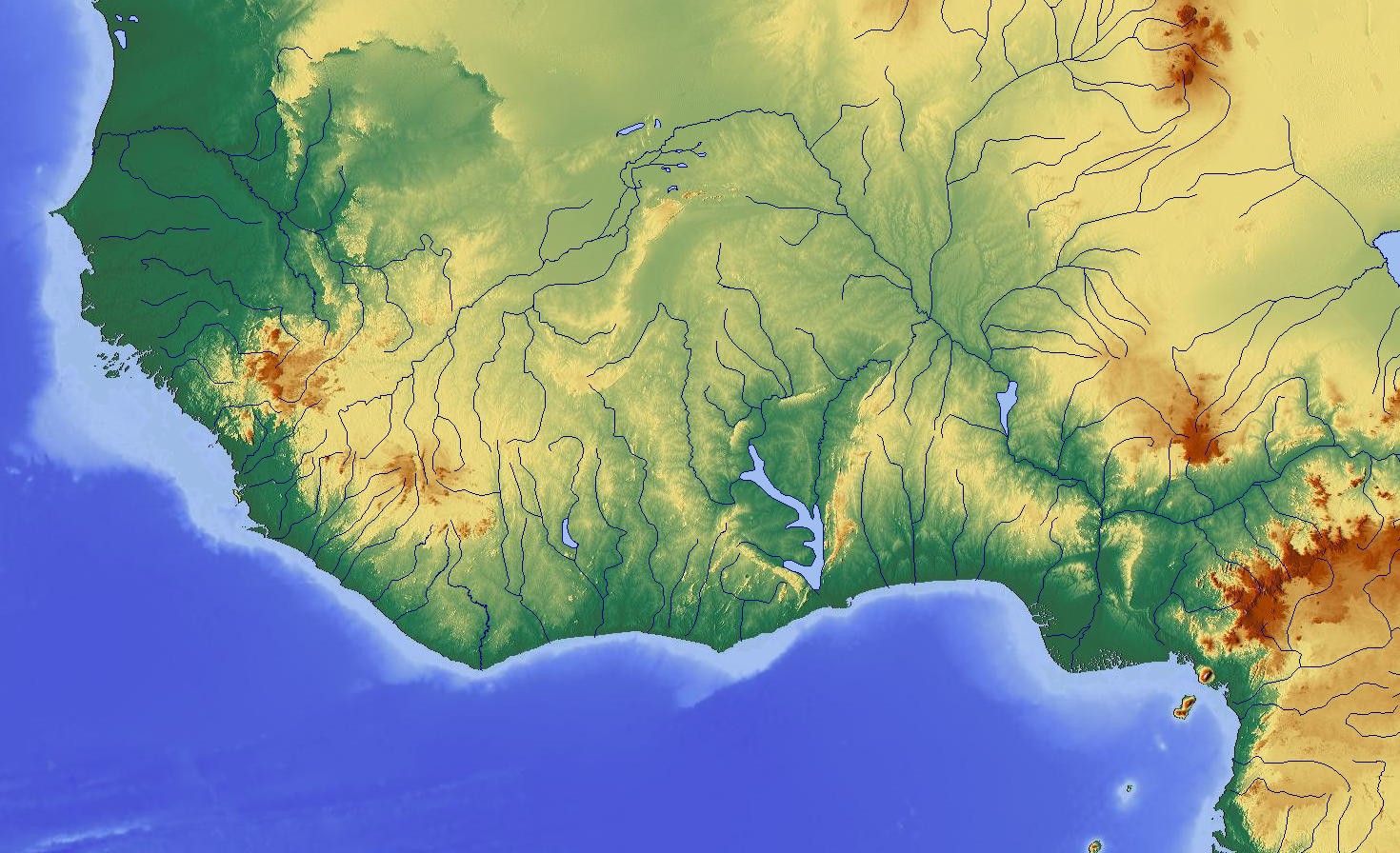 ギニア湾北部地図